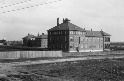 Esbjerg Sygehus i 1909.